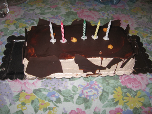 Рођенданска торта. Драган Цветковић.